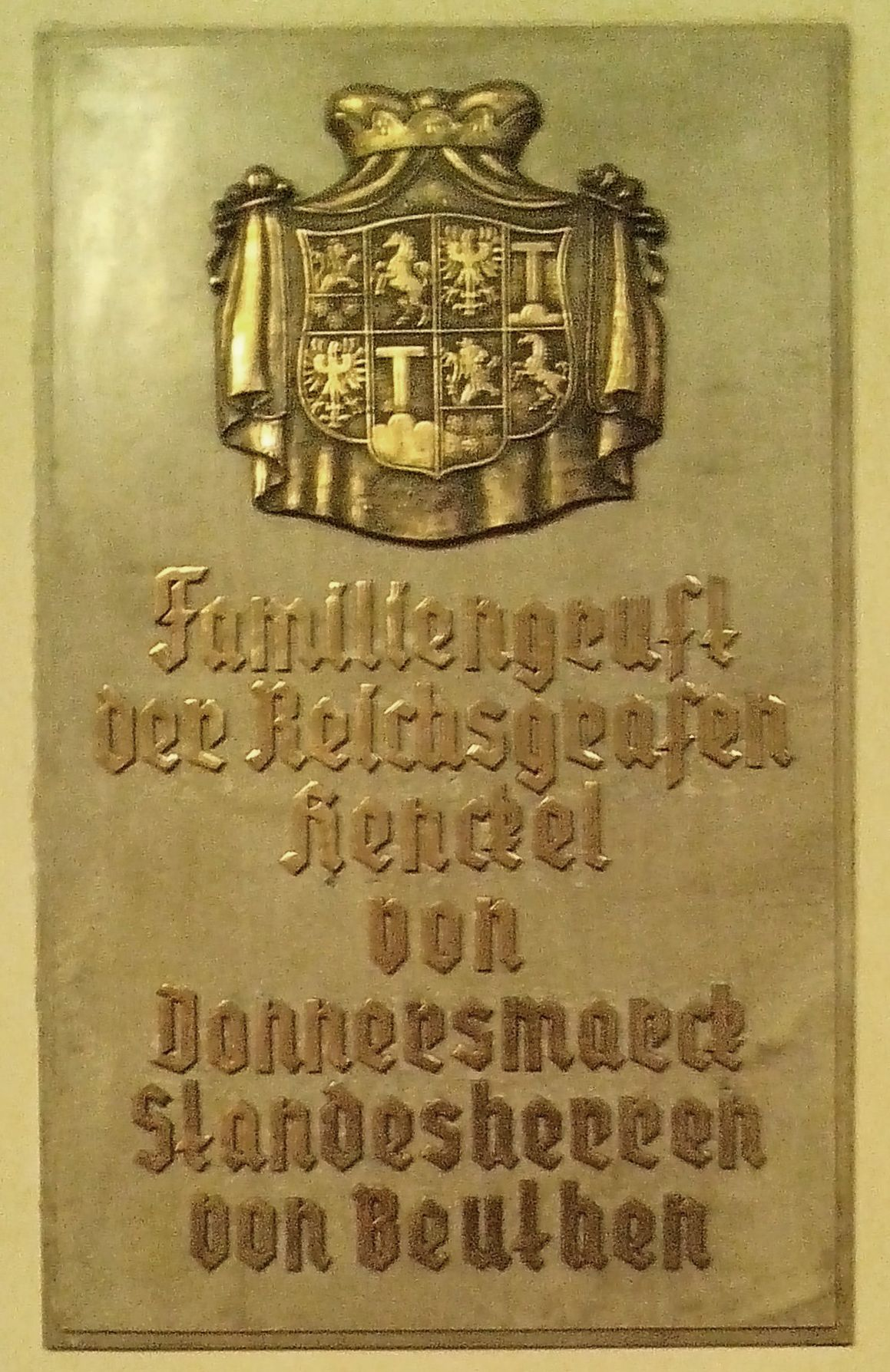 Tablica epitafijna rodu hrabiów von Donnersmarck w bytomskim kościele.